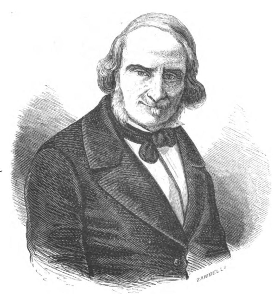 Depicted person: Terenzio Mamiani della Rovere – Italian writer and statesman